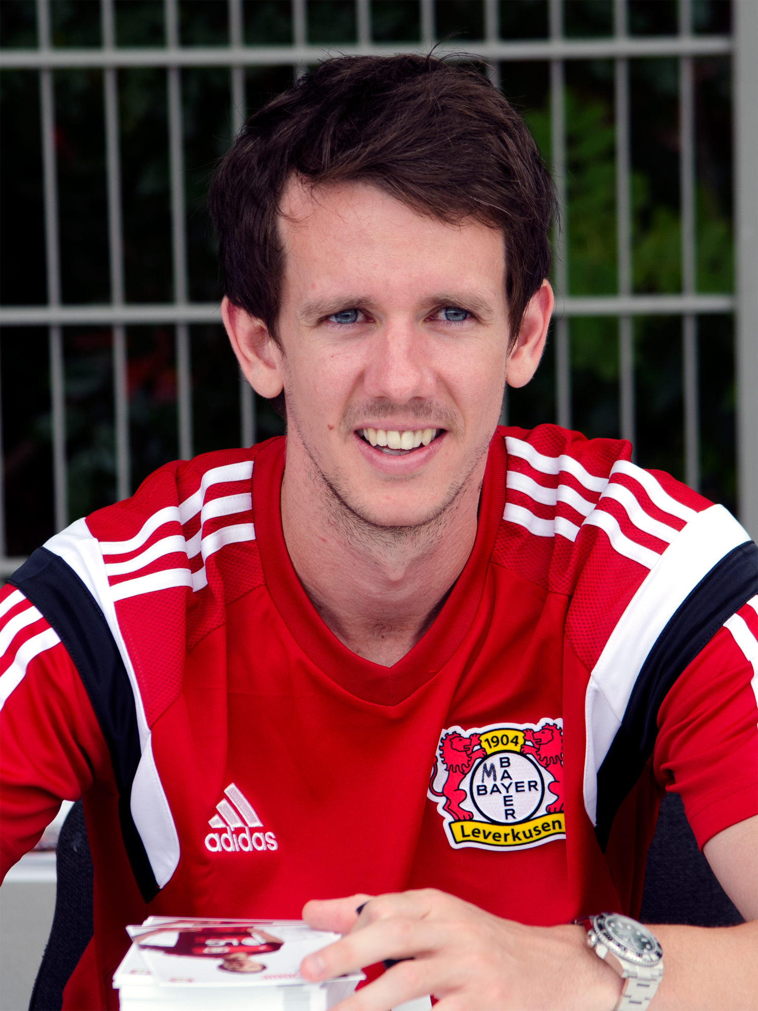 Robbie Kruse, australischer Fußballspieler